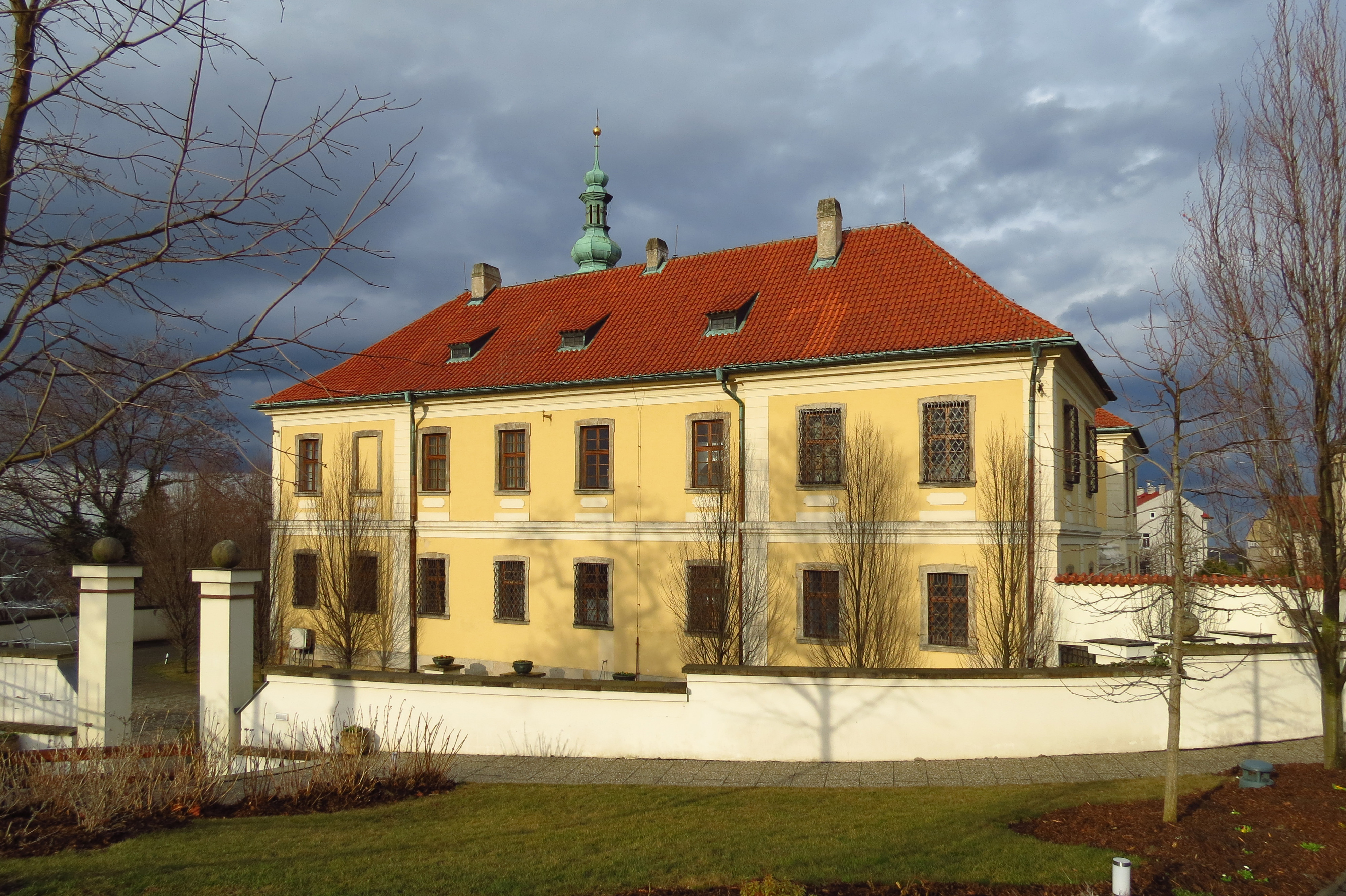 Kladno, barokní zámek z pol. 18. stol. - pohled na západní křídlo ze zahrady